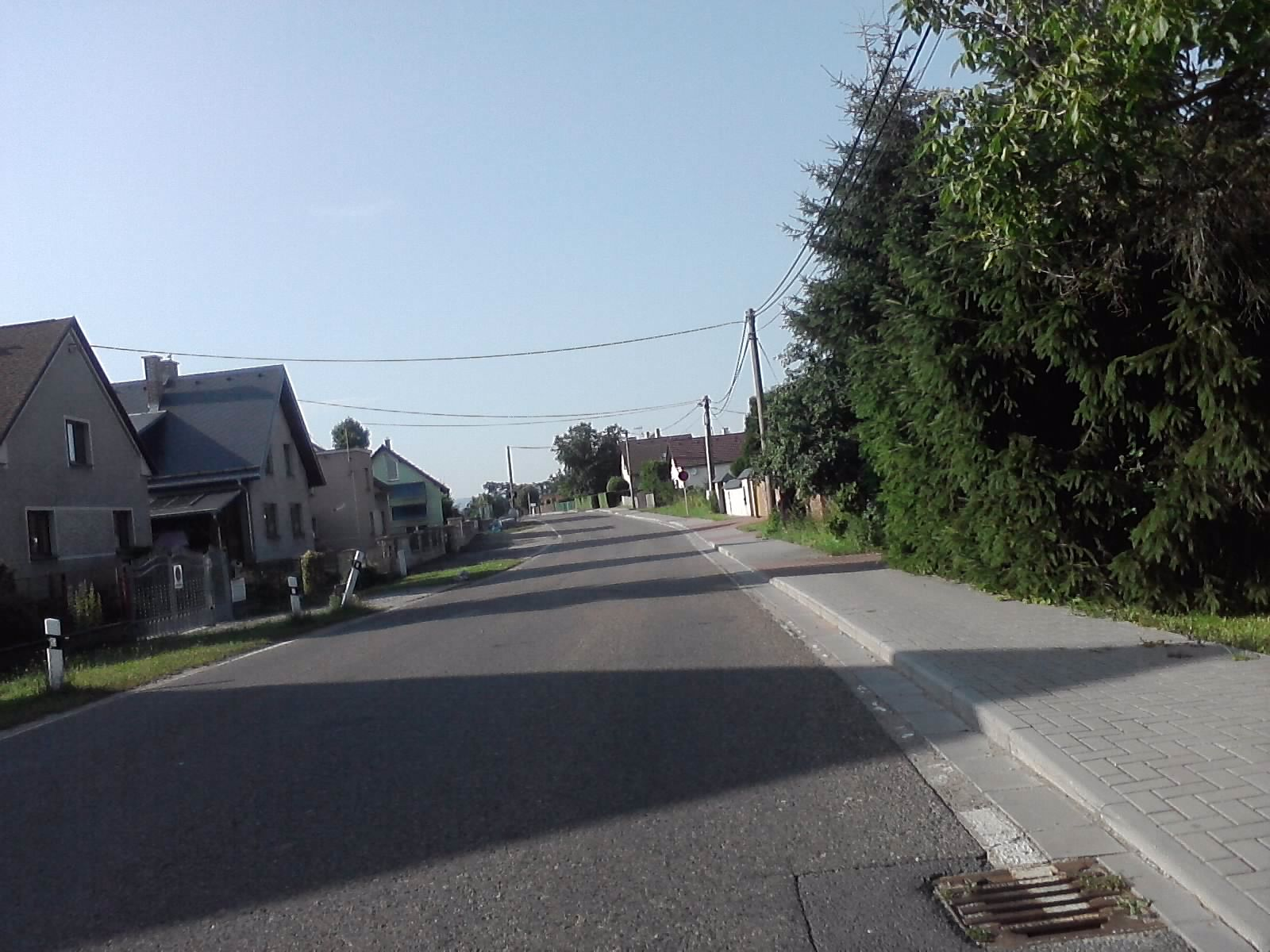 Obec Rasošky